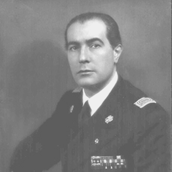 Politico italiano, ministro del Regno d'Italia nel governo Mussolini